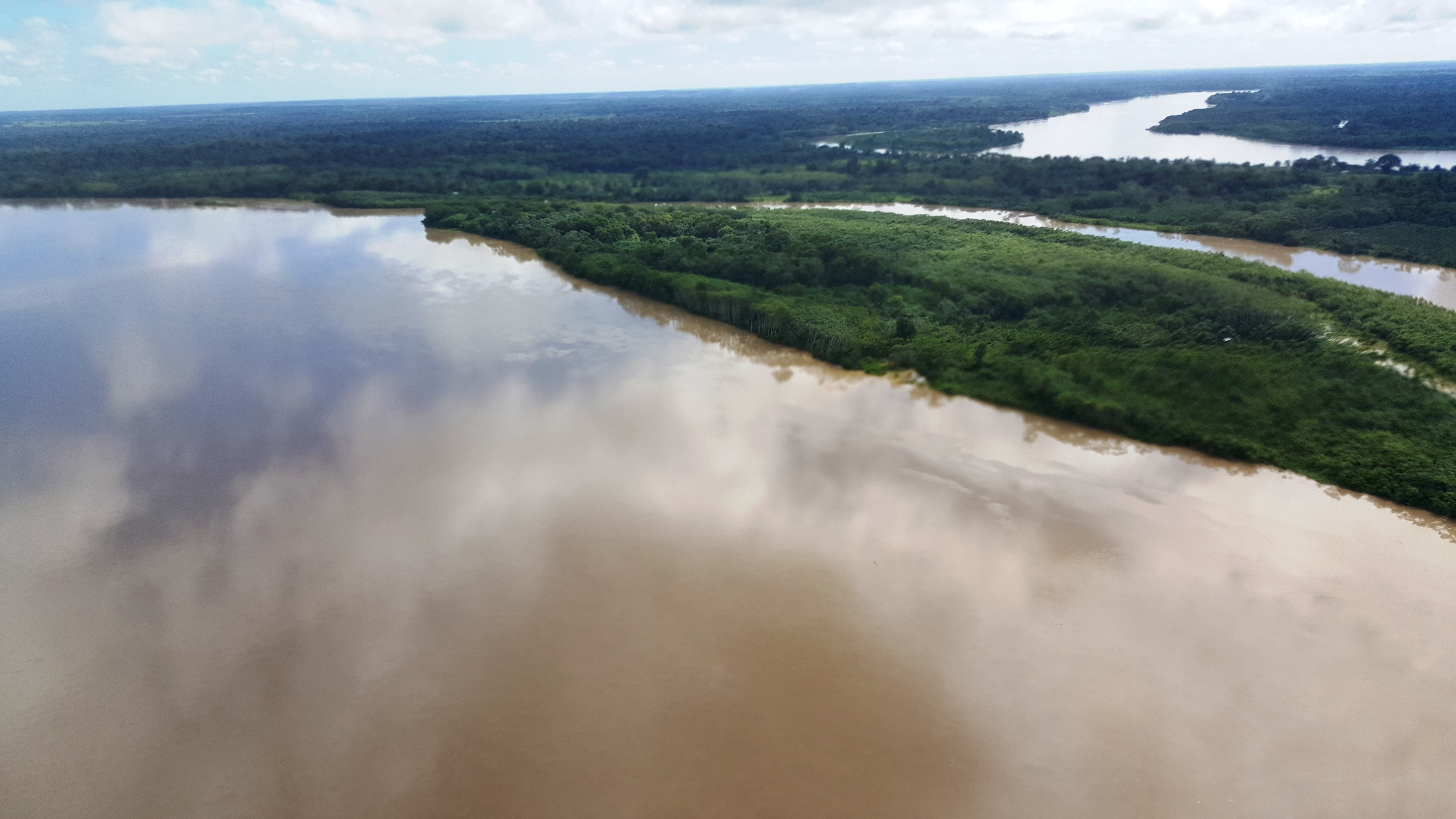 San Jose del Guaviare